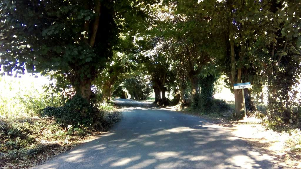 Vista do Pazo, Curtis.